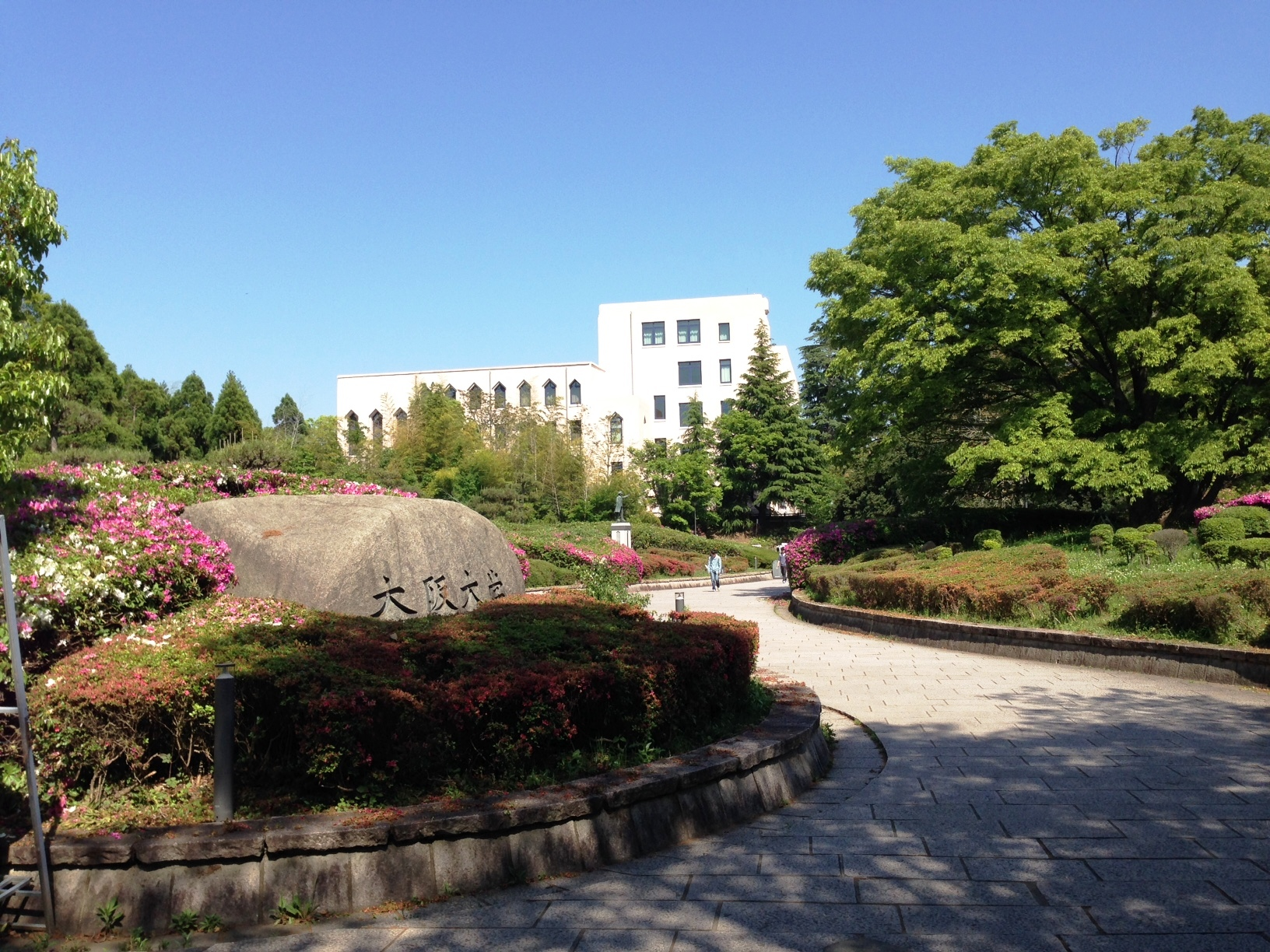 Basa Jawa: 大阪大学豊中キャンパス 石橋口